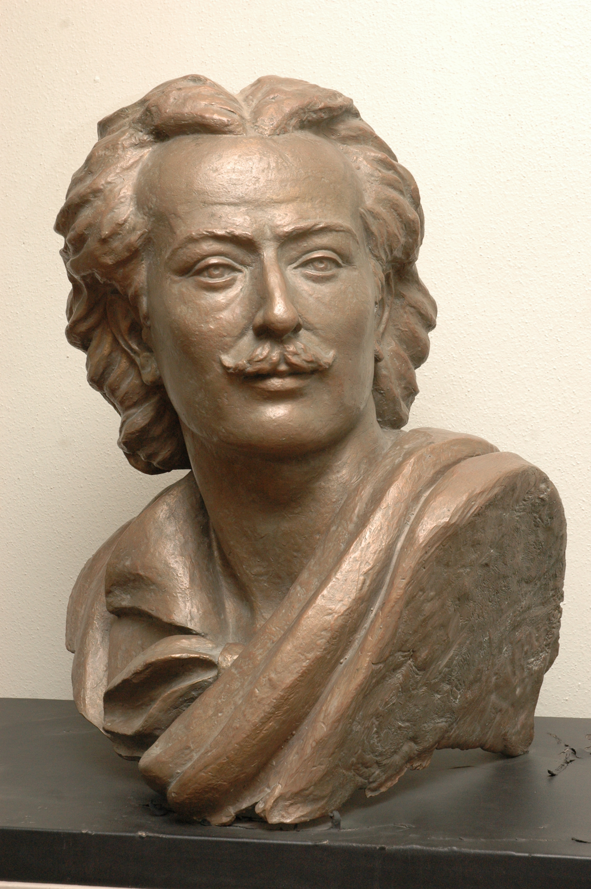 Պետրոս Ադամյան